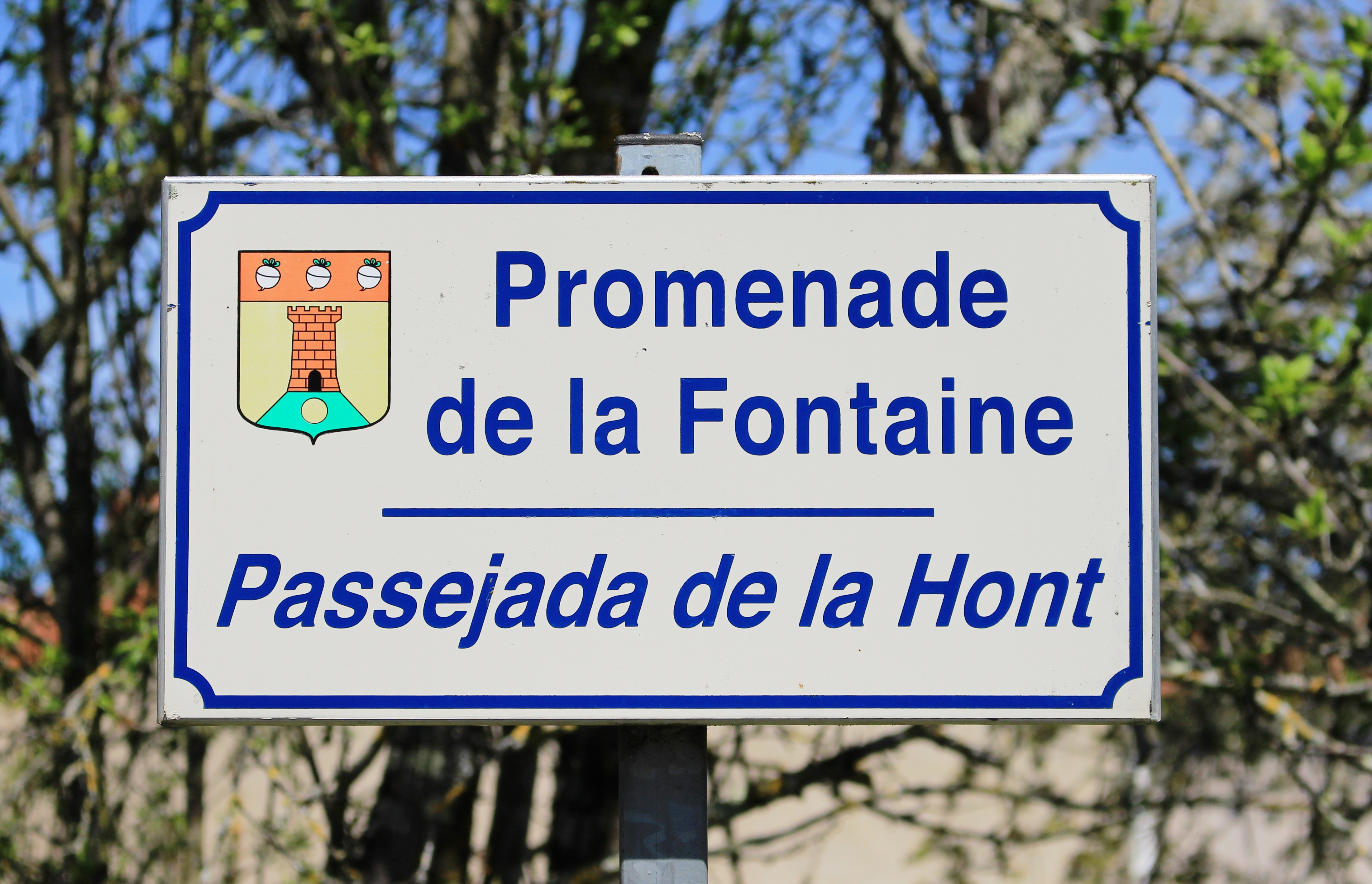 Rue du village de Castéra-Lou (Hautes-Pyrénées)